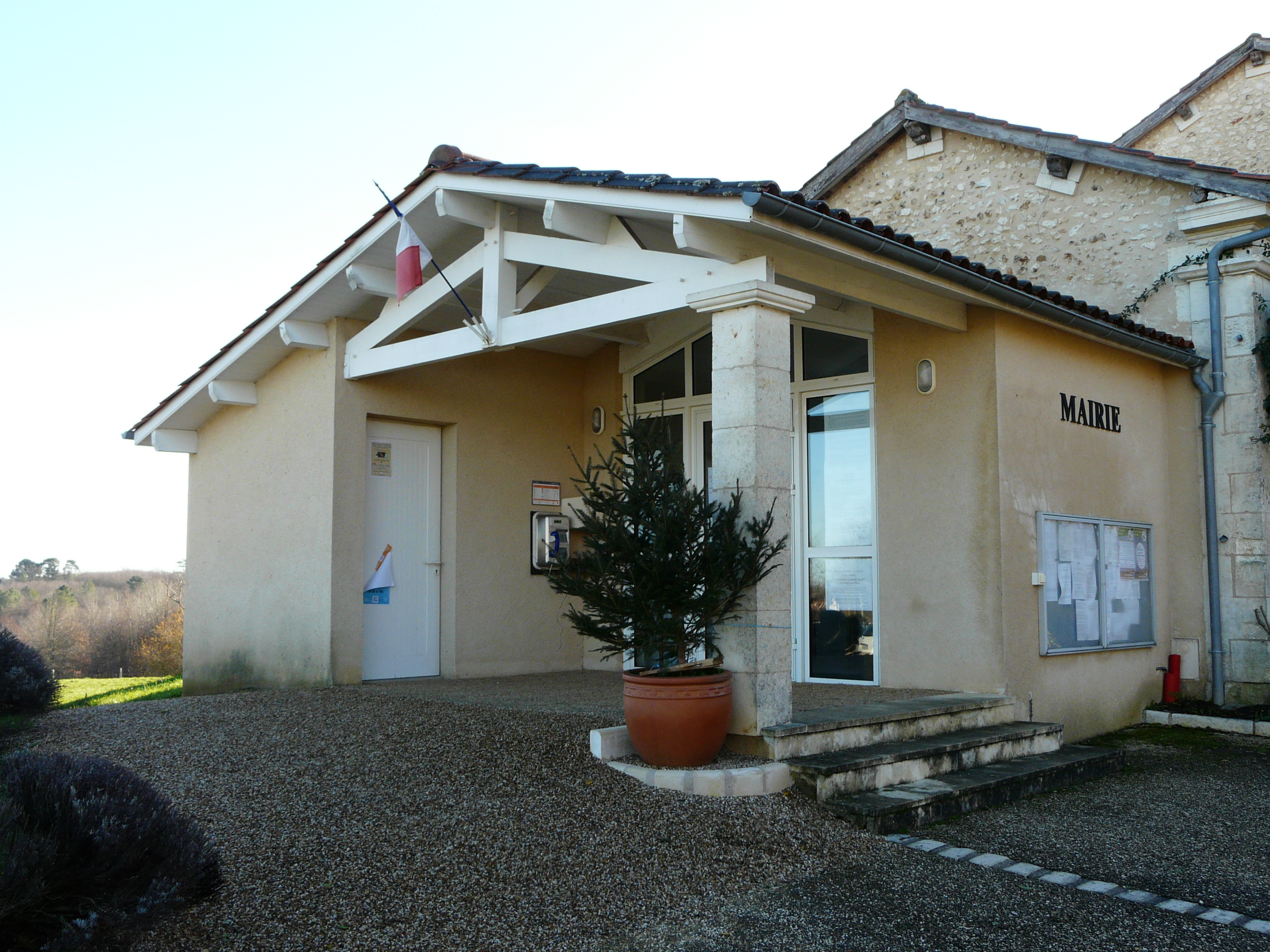 La mairie de Bourrou, Dordogne, France.